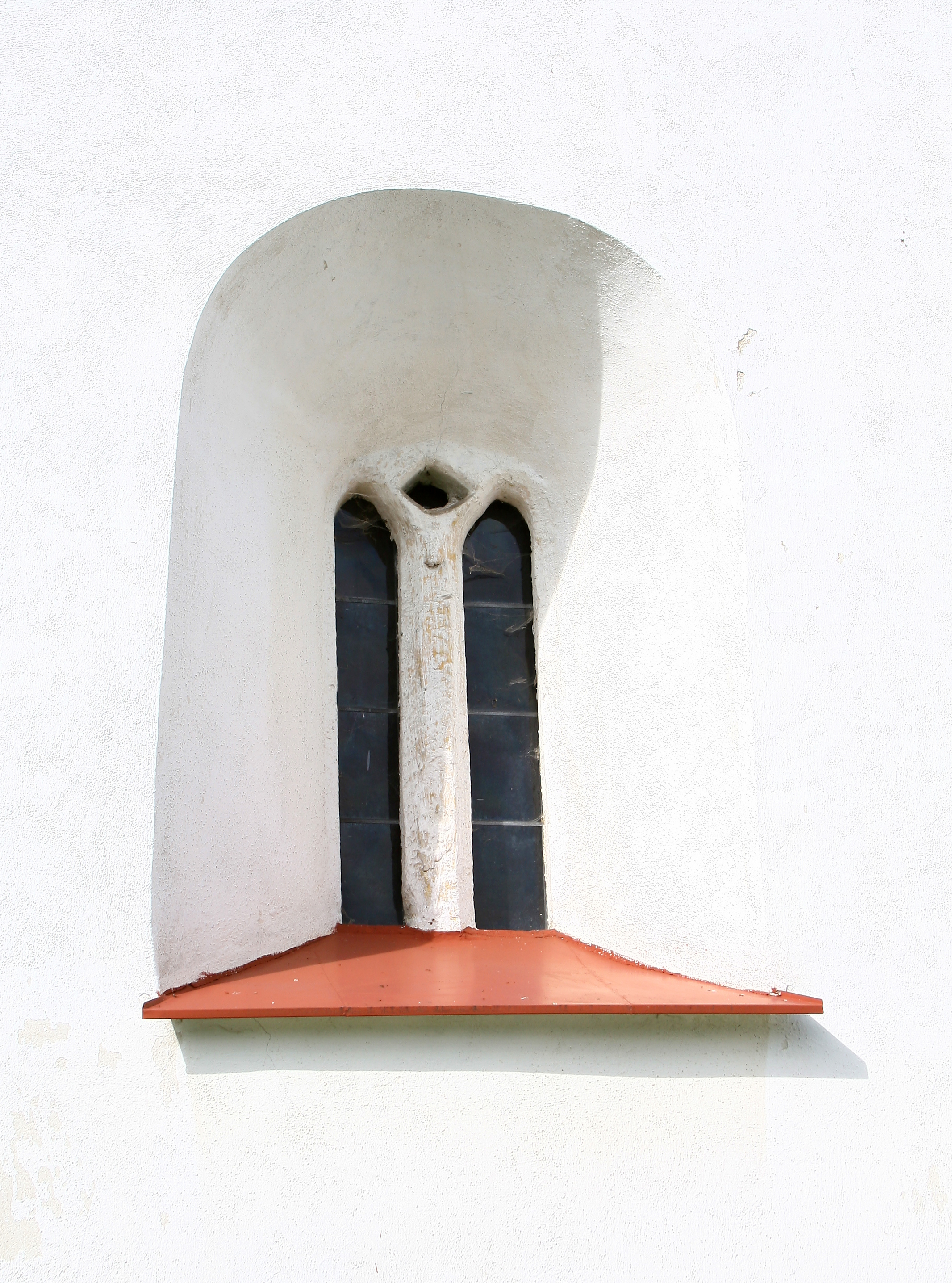 Kostel svatého Petra a Pavla v Albrechticích. Okno ve východním průčelí. Okres Klatovy, Plzeňský kraj, Česká republika.